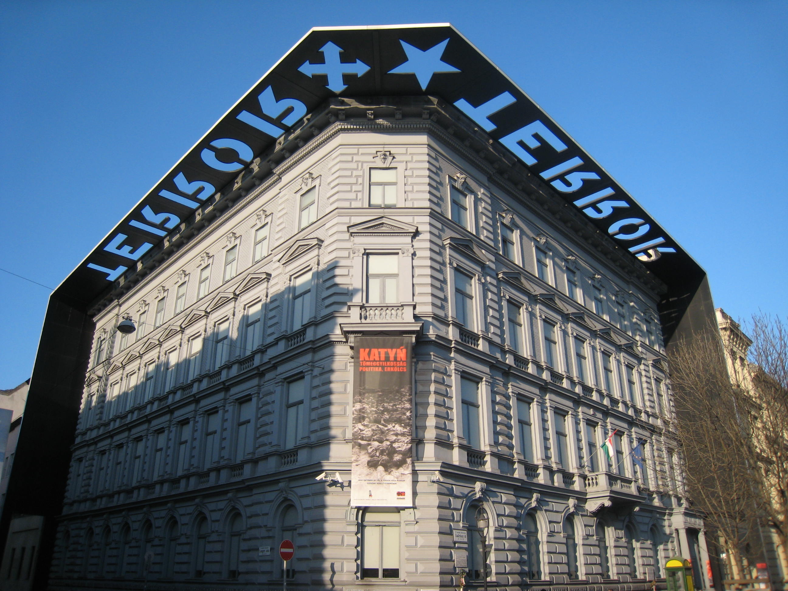 Budapest Haus des Terrors